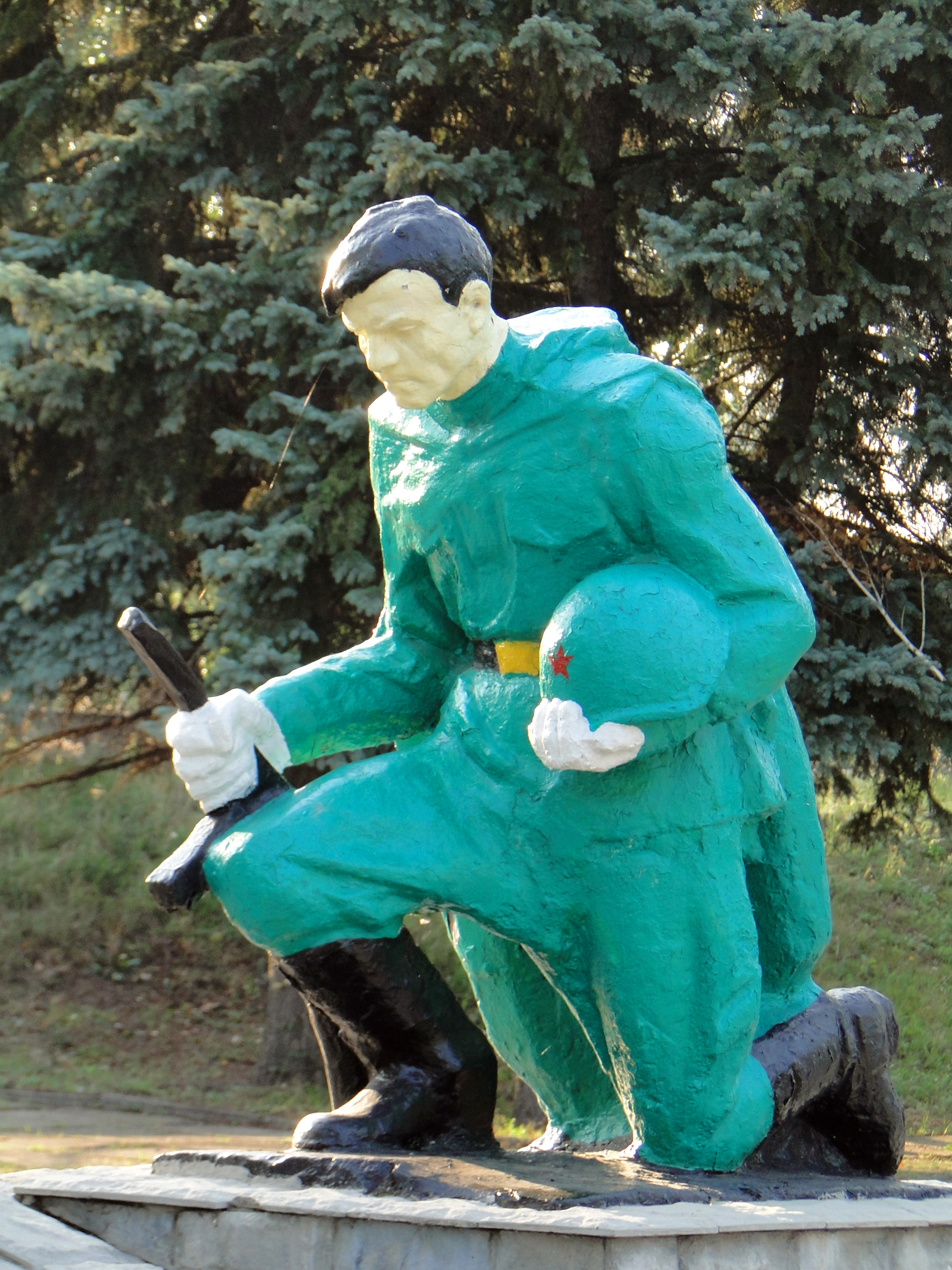 Братська могила радянських воїнів Південно-Західного фронту і пам'ятник воїнам-землякам